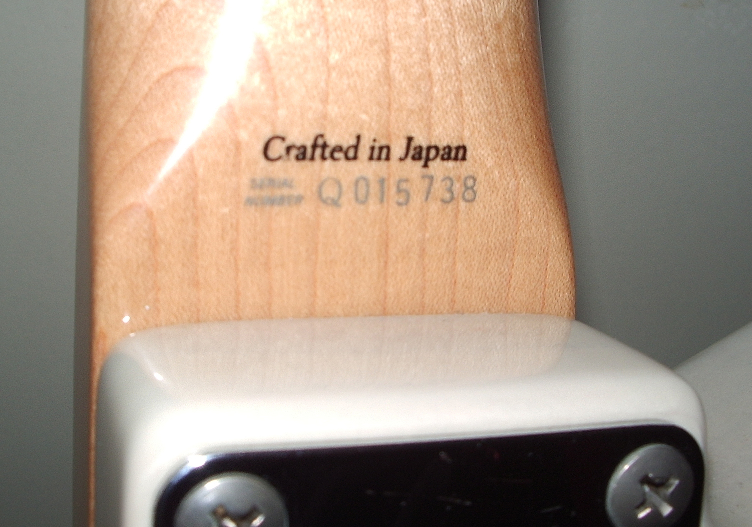 Fender Japan serial number